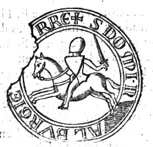 Galburge de Meuillon